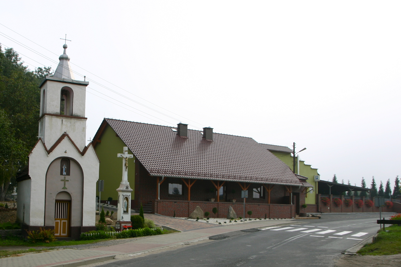 Januszkowice – wieś w Polsce położona w województwie opolskim, w powiecie krapkowickim, w gminie Zdzieszowice.